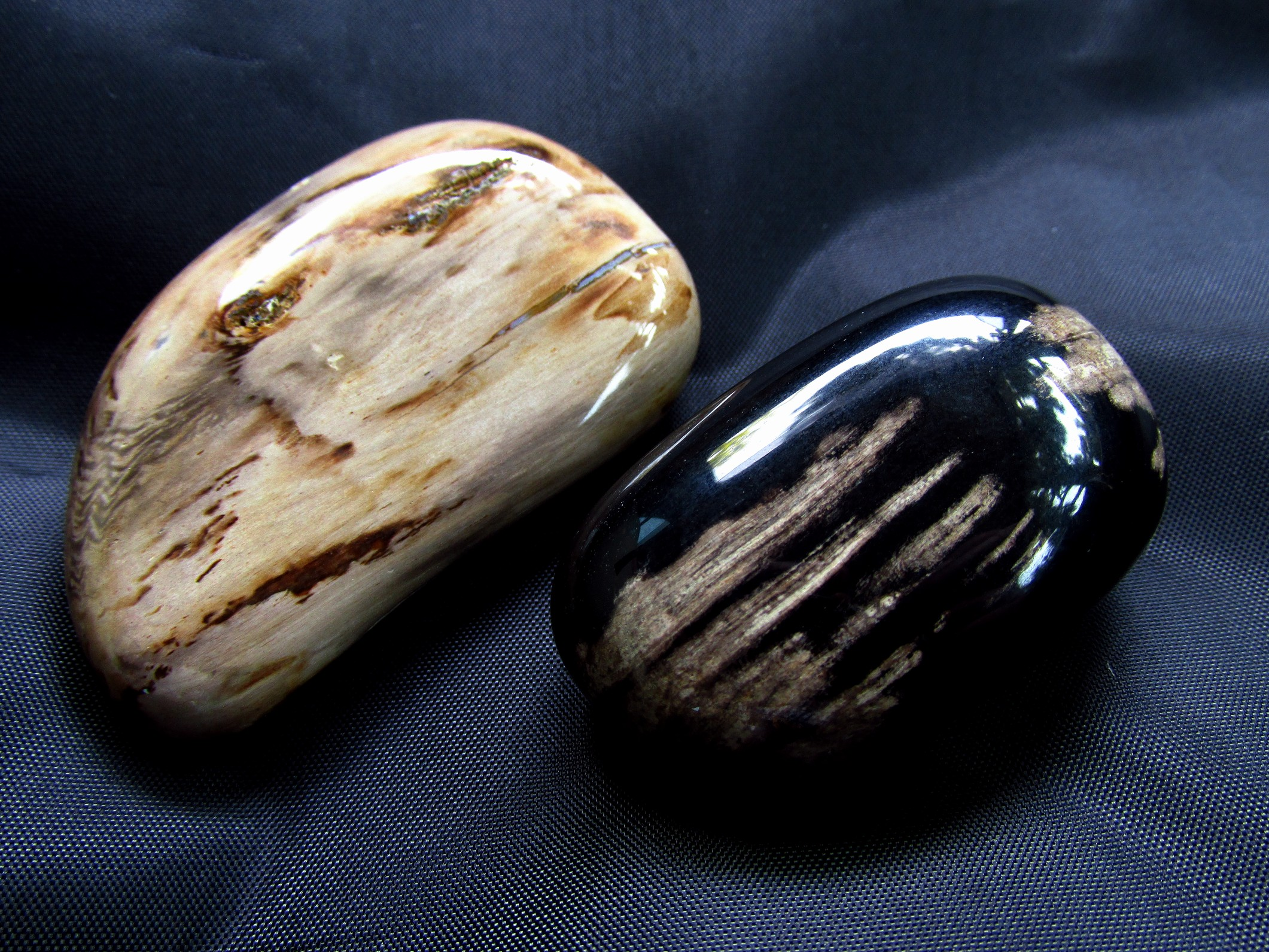 珪化木 , Petrified wood , 津軽錦石（研磨済）